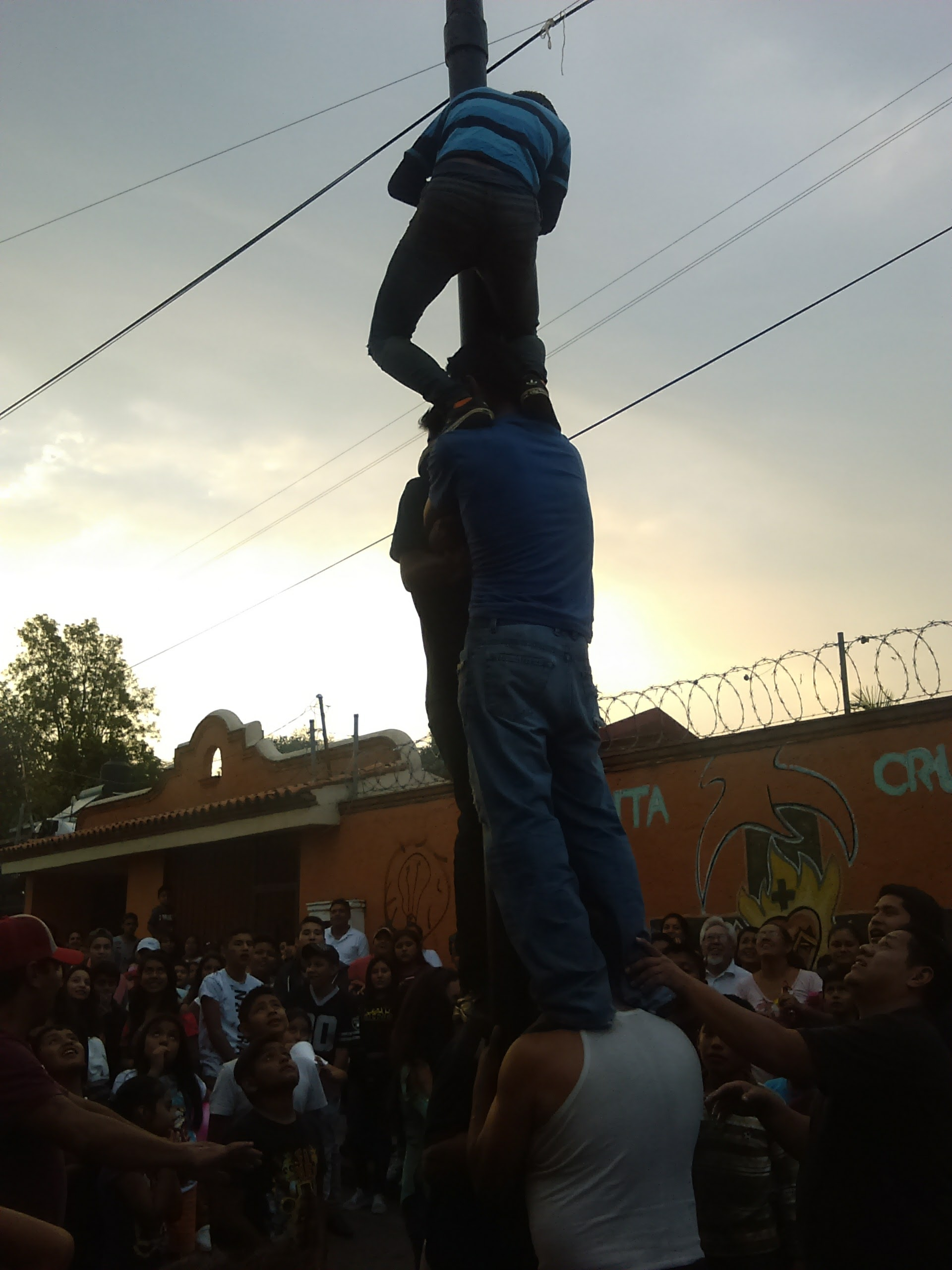 palo encebado en el día de la Cruz en Tetela del Monte